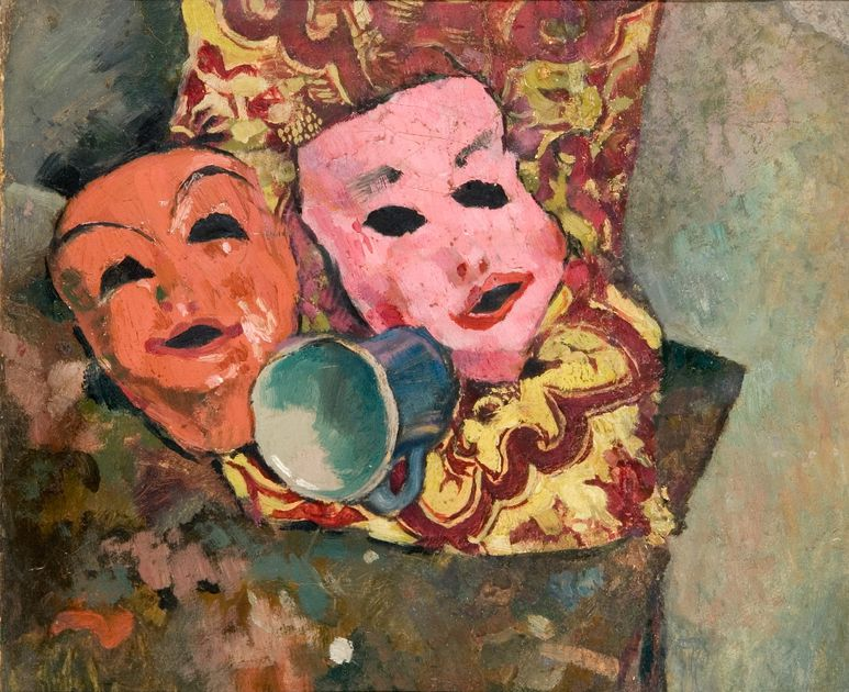 Masks